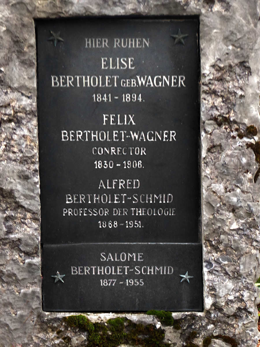 Alfred Bertholet-Schmid (1868–1951) Professor der Theologie, Grab auf dem Friedhof Wolfgottesacker, Basel